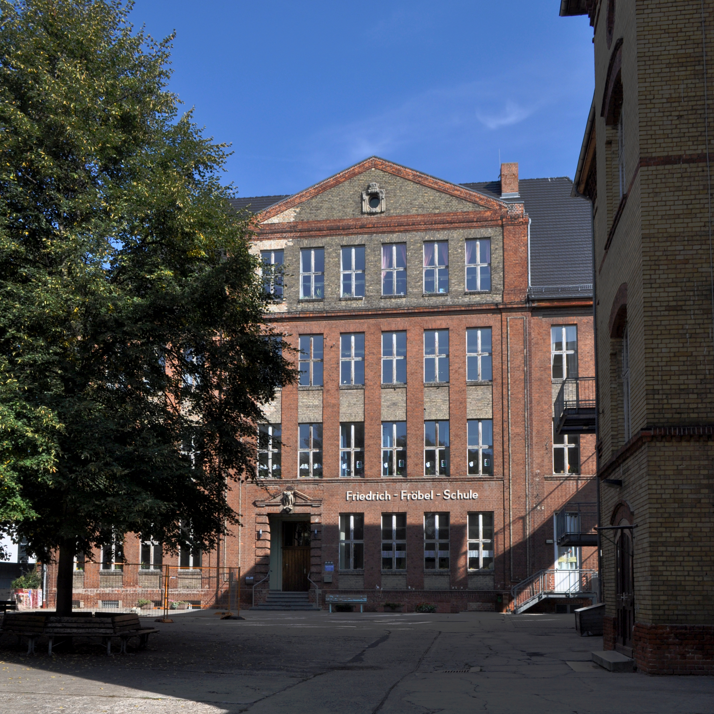 Friedrich-Fröbel-Schule in Magdeburg-Altstadt. This is a photograph of an architectural monument.It is on the list of cultural monuments of Magdeburg